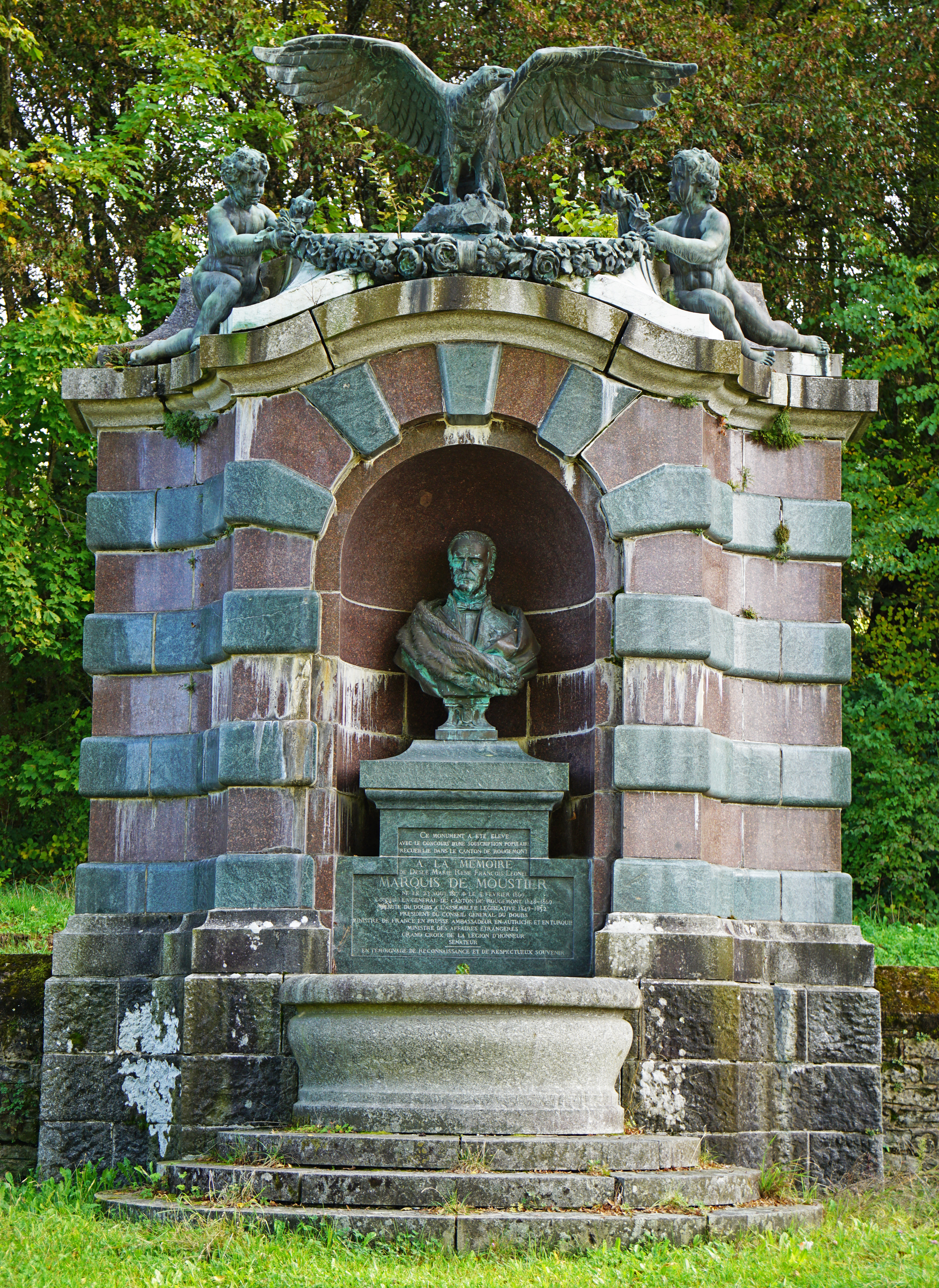 Monument érigé en hommage à Léonel de Moustier sur la commune de Cubry.